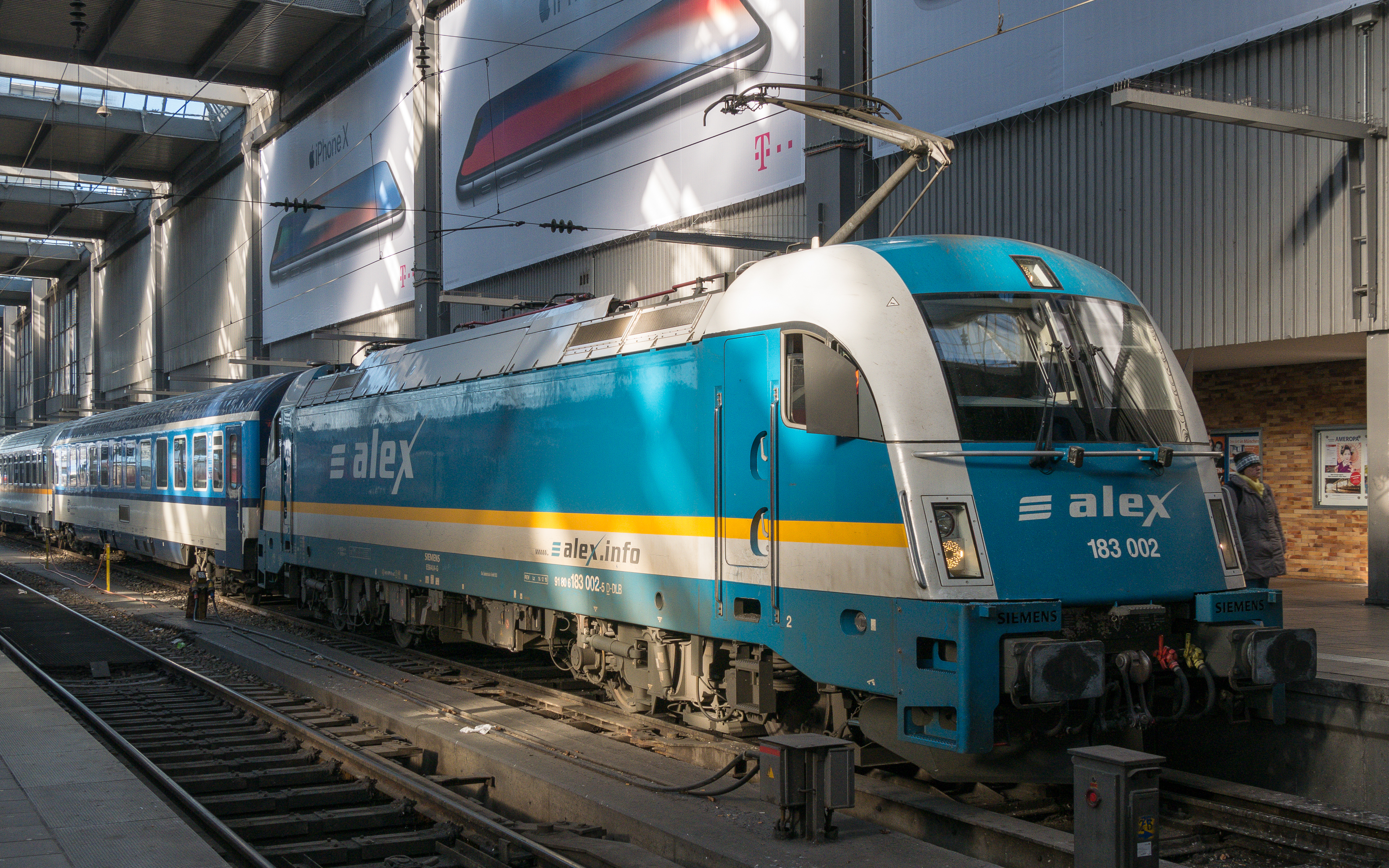 Alex 183 002 (Siemens ES64U4 Taurus 2) im Münchener Hauptbahnhof